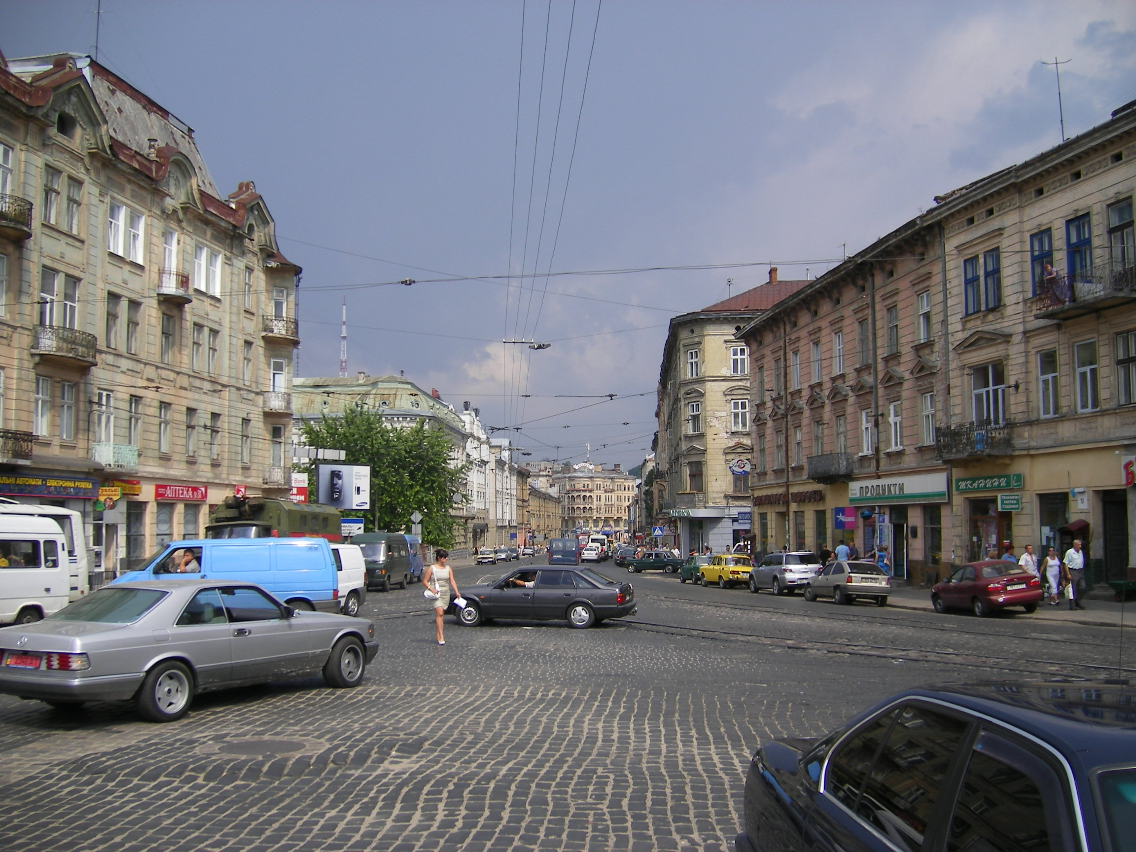 Lviv, Street view